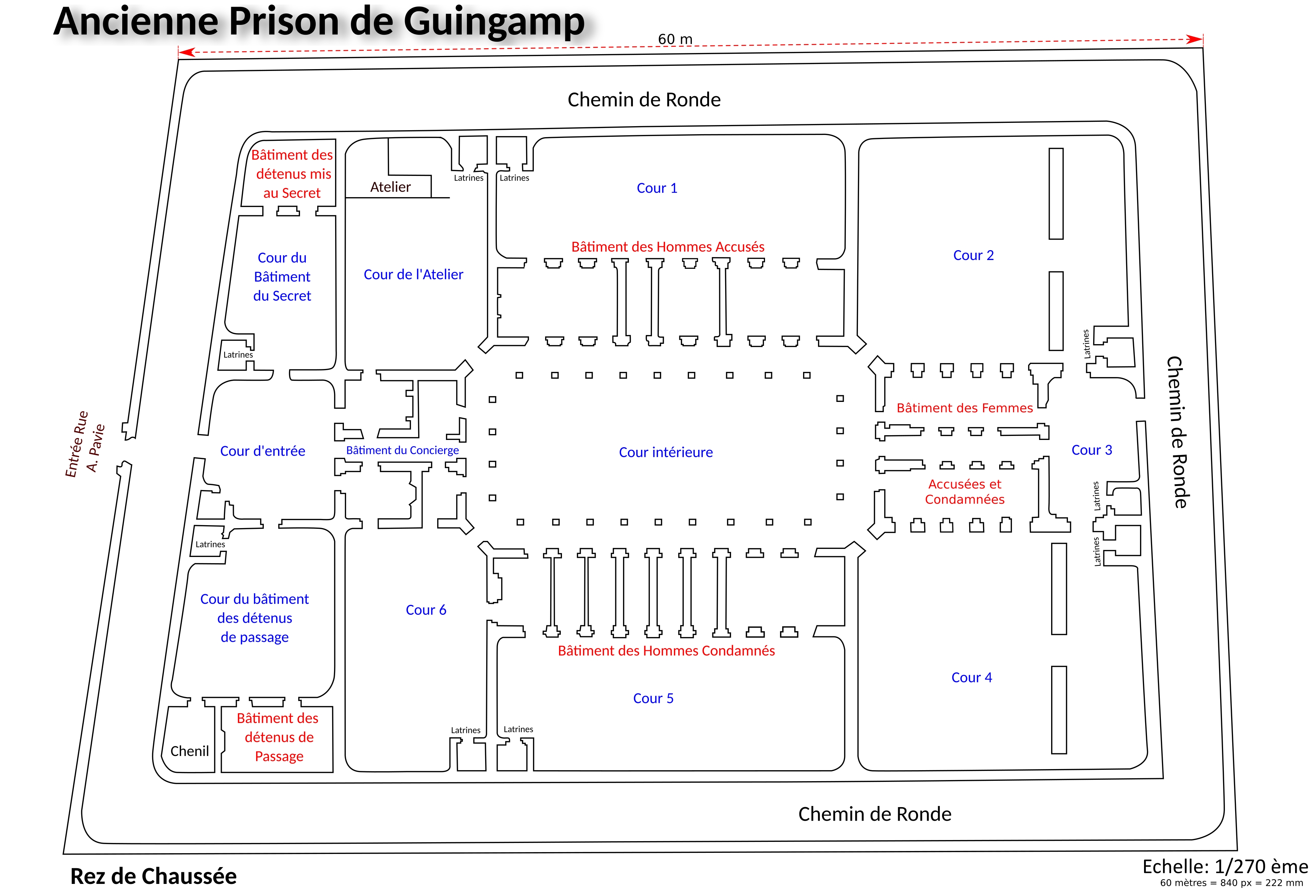 Plan au sol, ancienne prison Guingamp